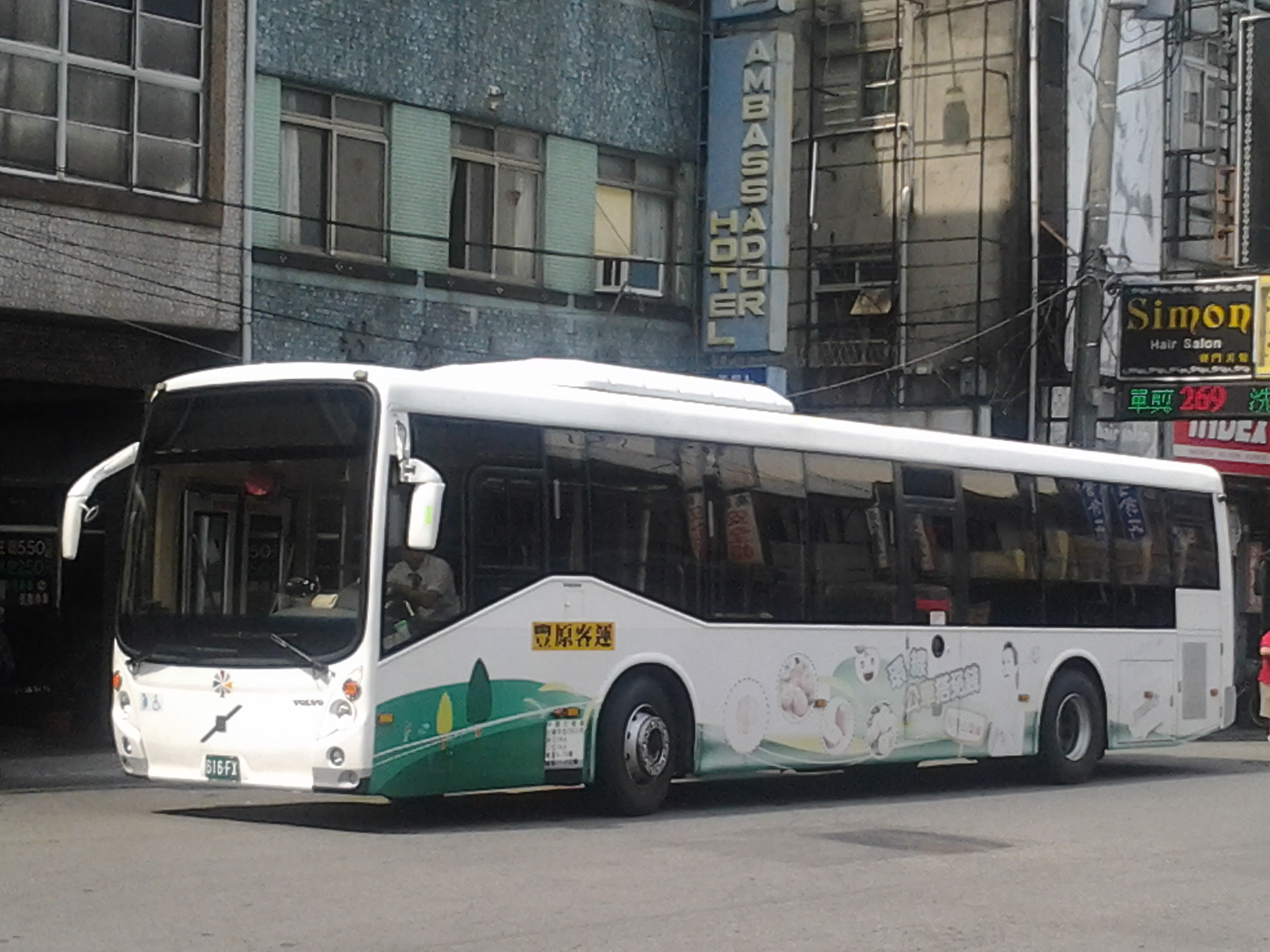 豐原客運Volvo B7RLE大客車616-FX。